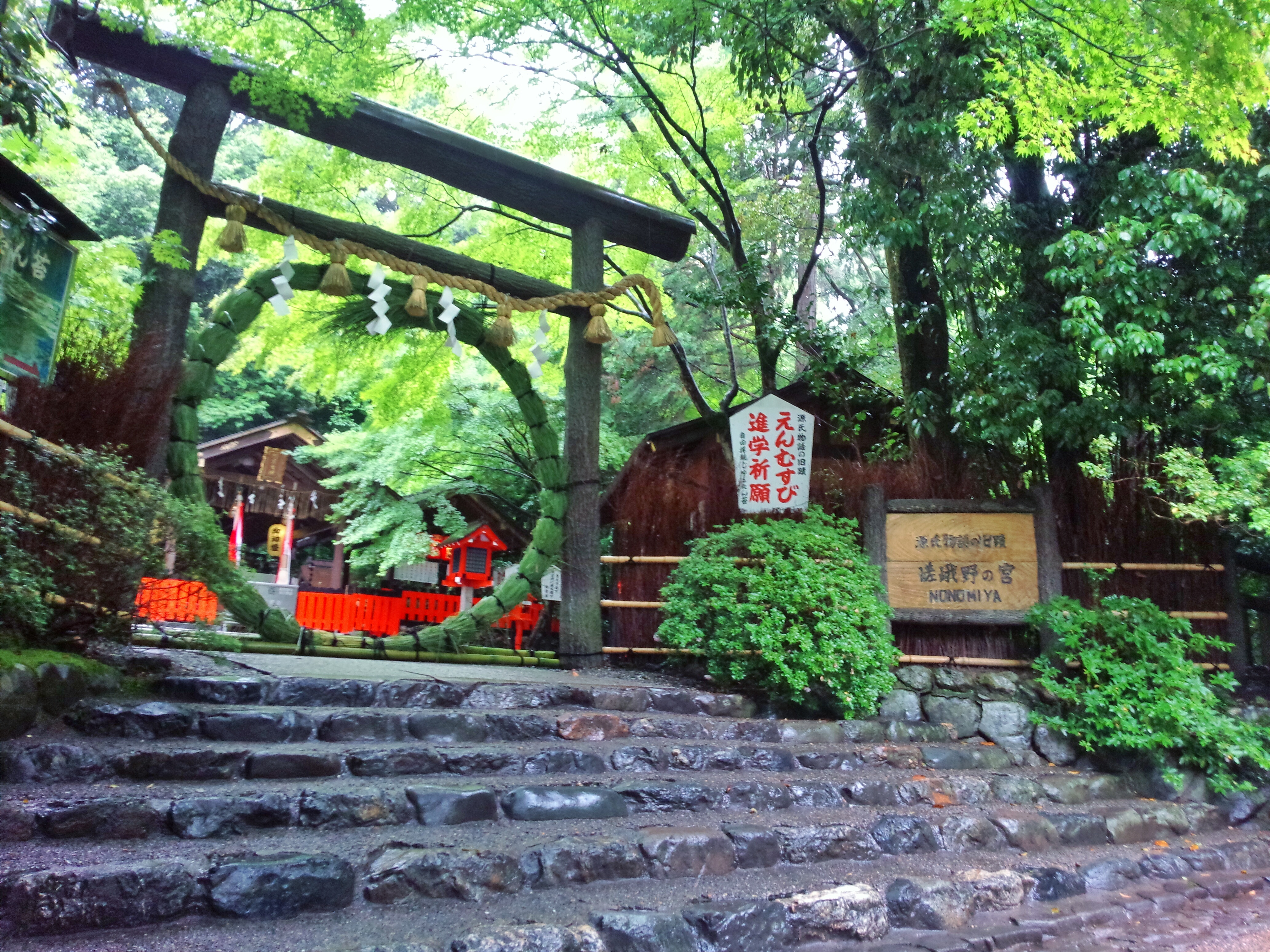 毎年6月30日に執行される夏越しの祓い